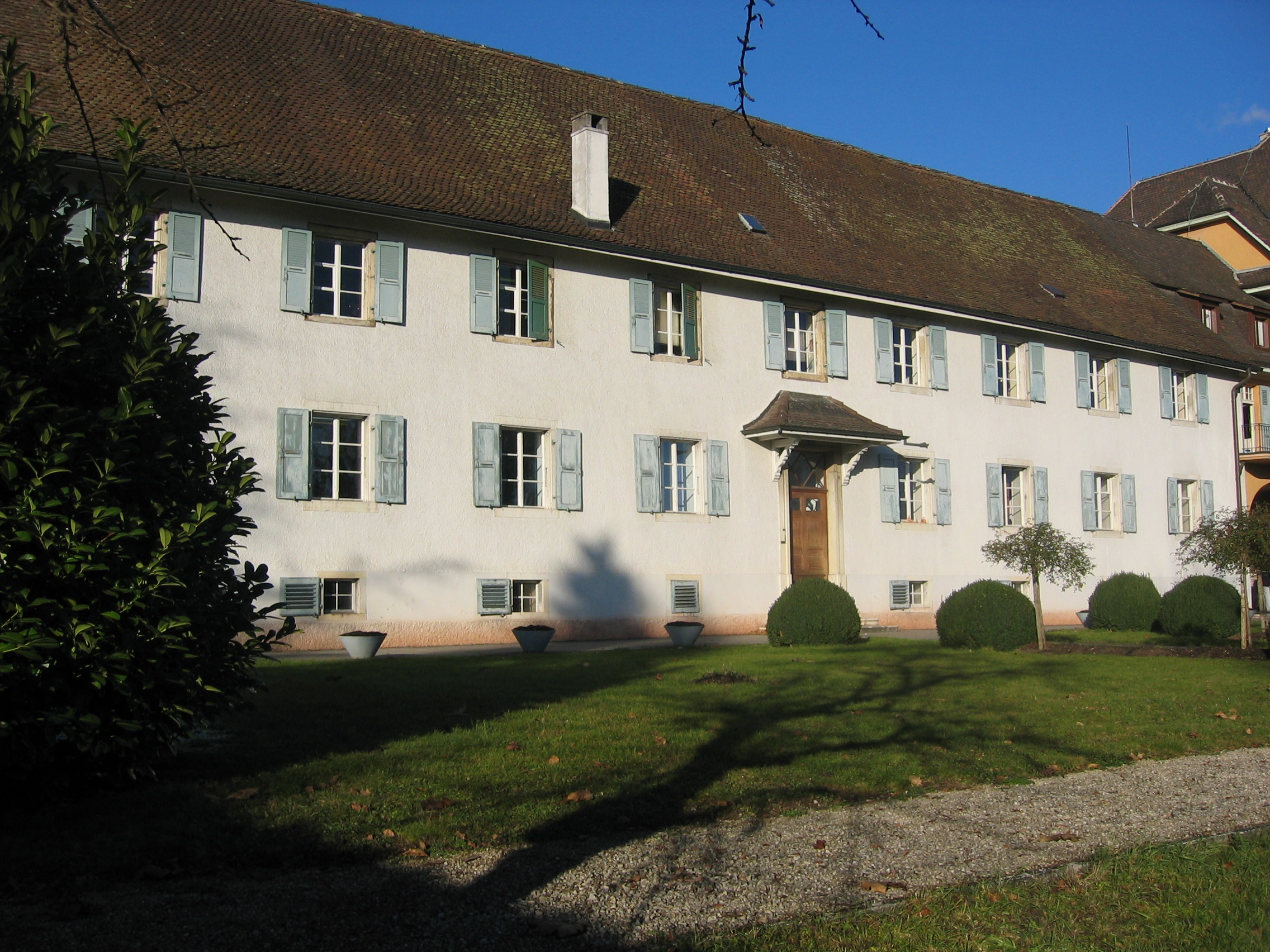 Ancien Couvent des Capucins à Delémont. Actuellement le bâtiment abrite une partie de l'Ecole cantonale de culture générale.